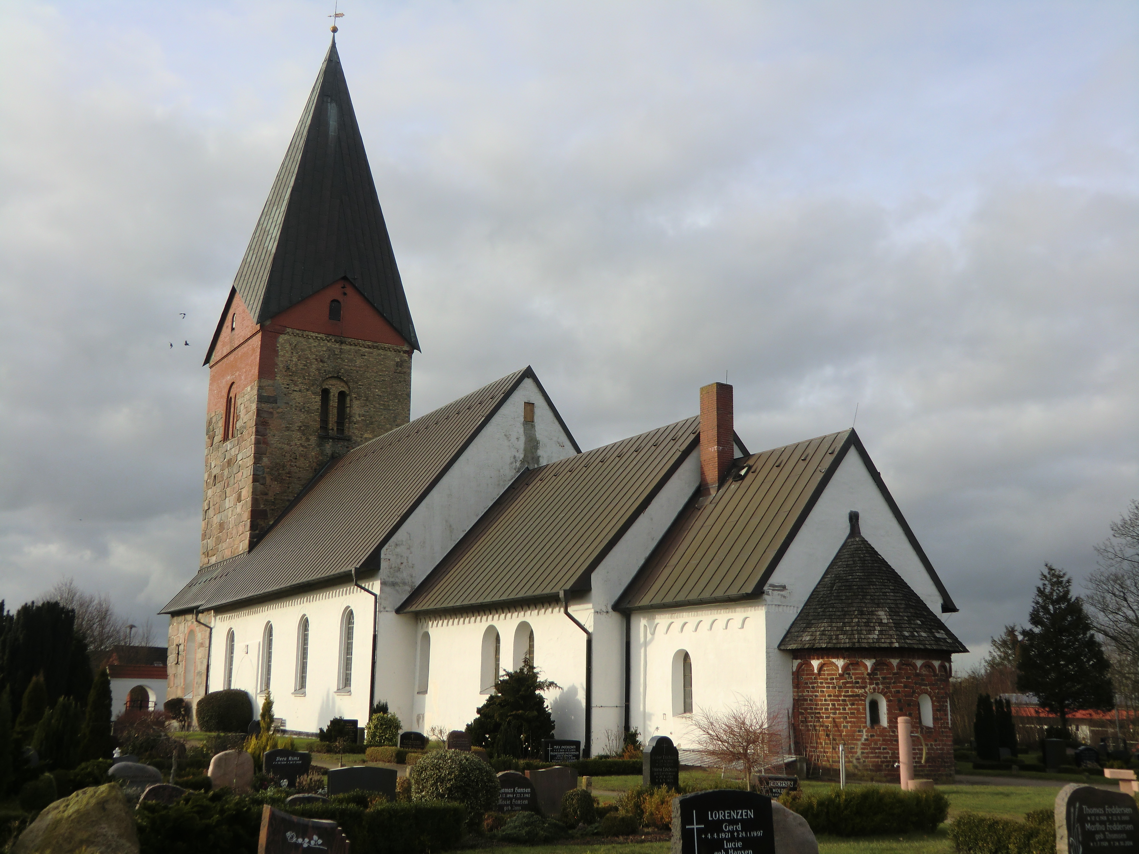 Kirche